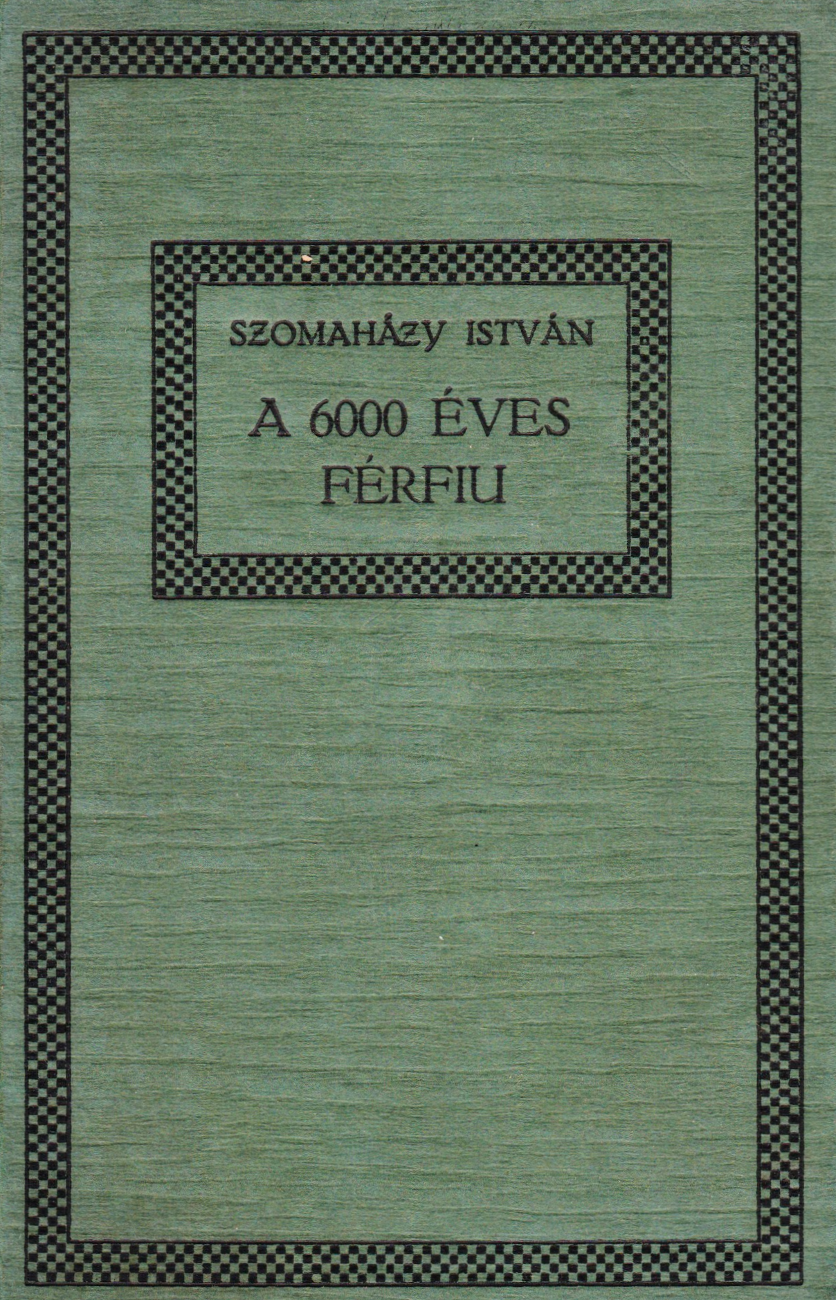 Szomaházy István: A 6000 éves férfiú (1910 körül), a borítódísz tervező nem ismert